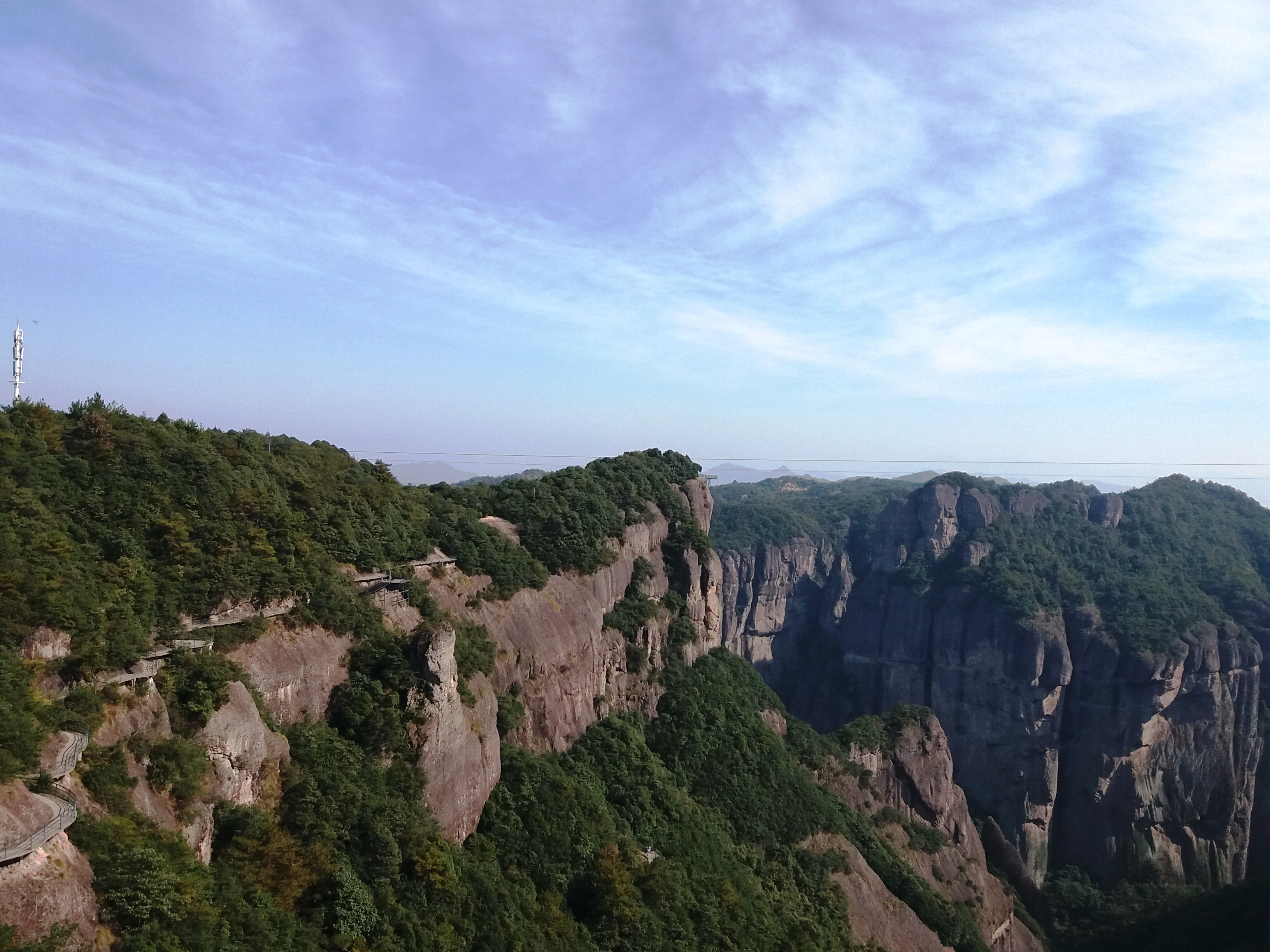 台州神仙居